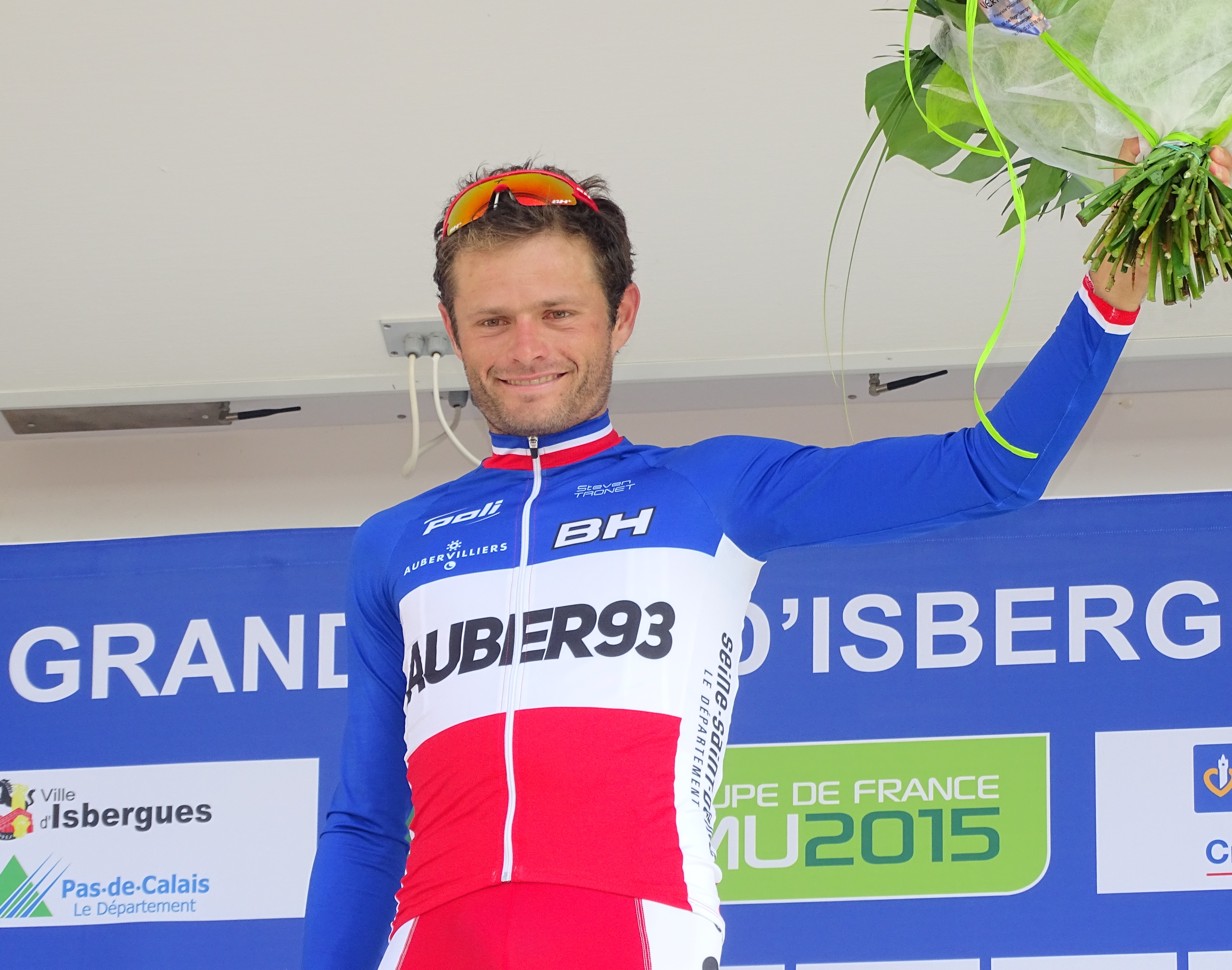 Reportage réalisé le dimanche 20 septembre à l'occasion du départ et de l'arrivée du Grand Prix d'Isbergues 2015 à Isbergues, Nord-Pas-de-Calais, France.